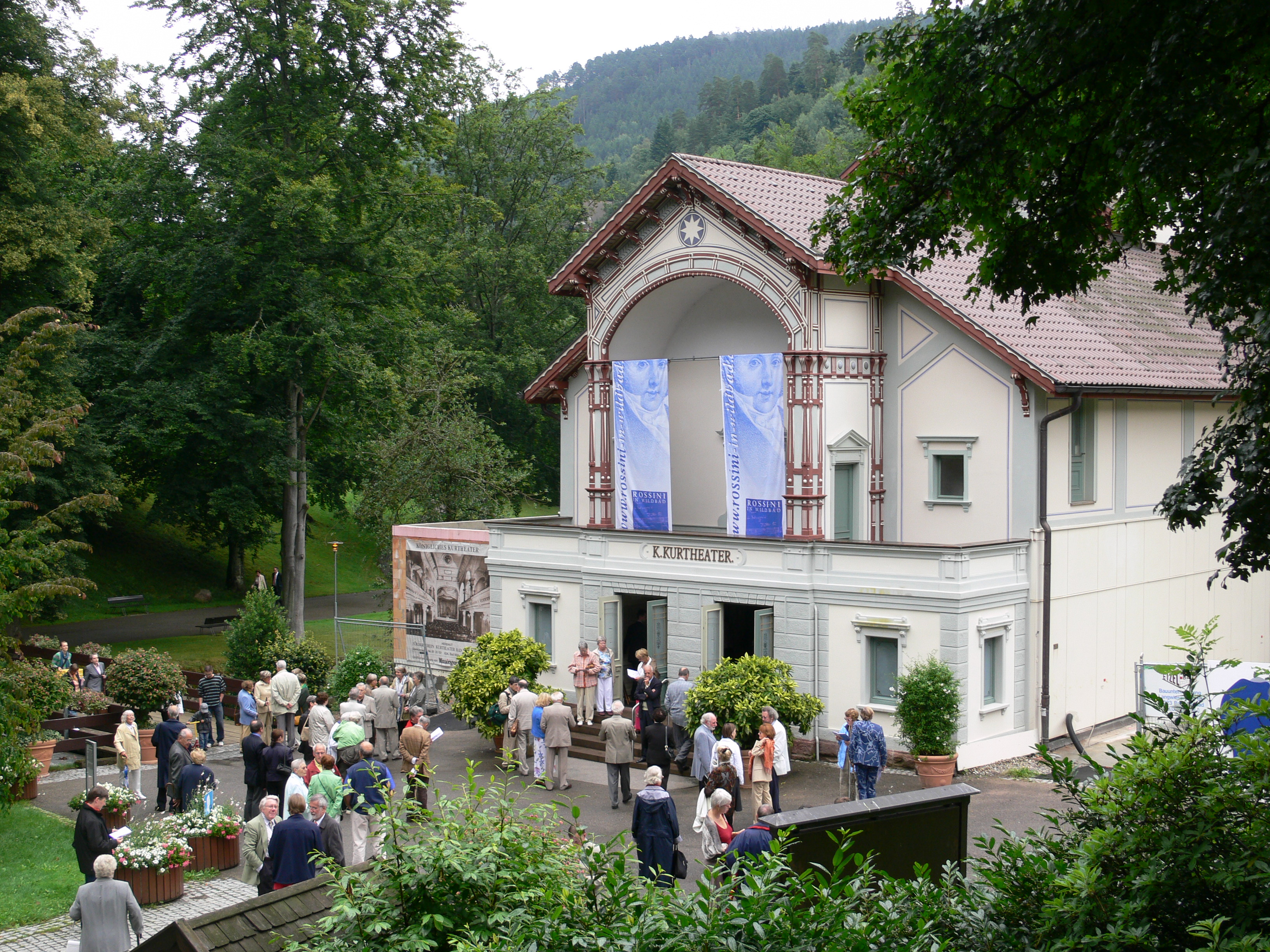 Bad Wildbad, Landkreis Calw, Baden-Württemberg: Kurtheater vor einer Vorstellung des Festivals "Rossini in Wildbad" 2008